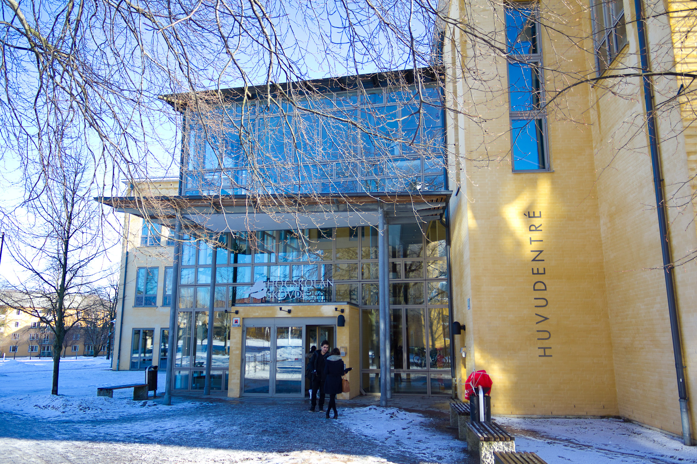 Huvudingången till Högskolan i Skövde